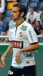 Björn Anklev